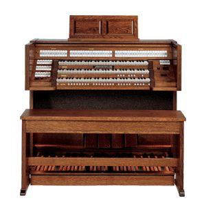 orgue Johannus SWEELINCK 35